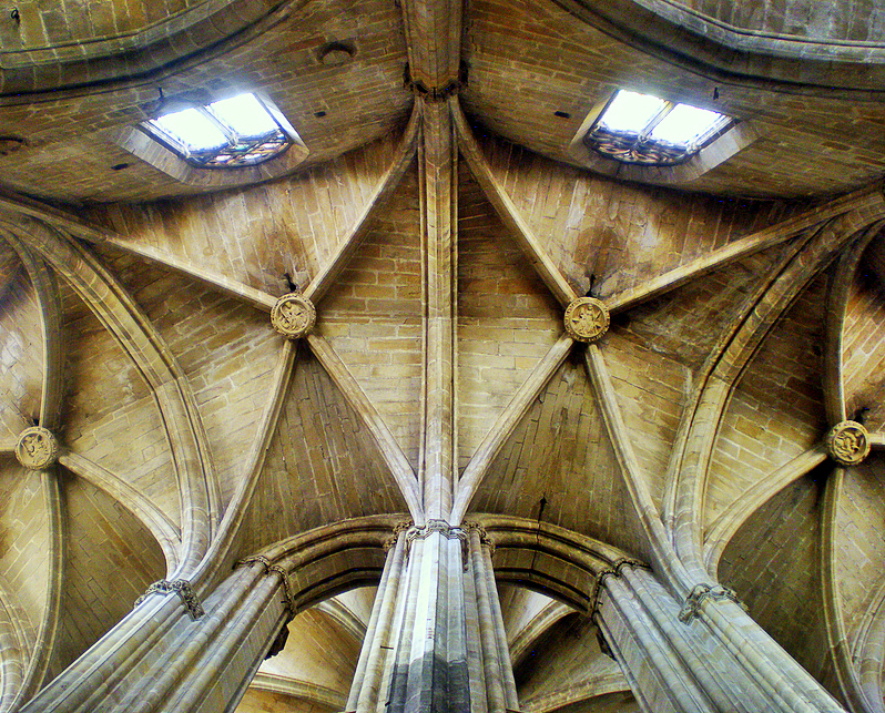 Catedral de Santa Maria (Tortosa)